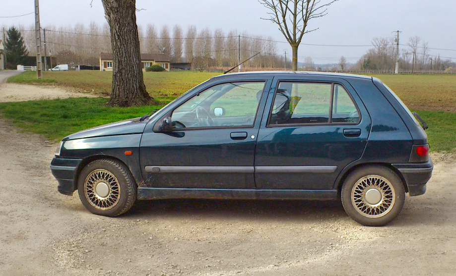 Photo de ma propre Clio baccara pour un article sur Wikipedia